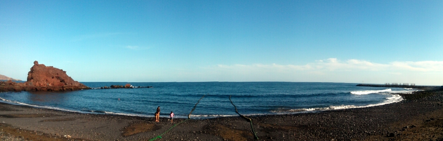 Panorámica de la playa del Burrero